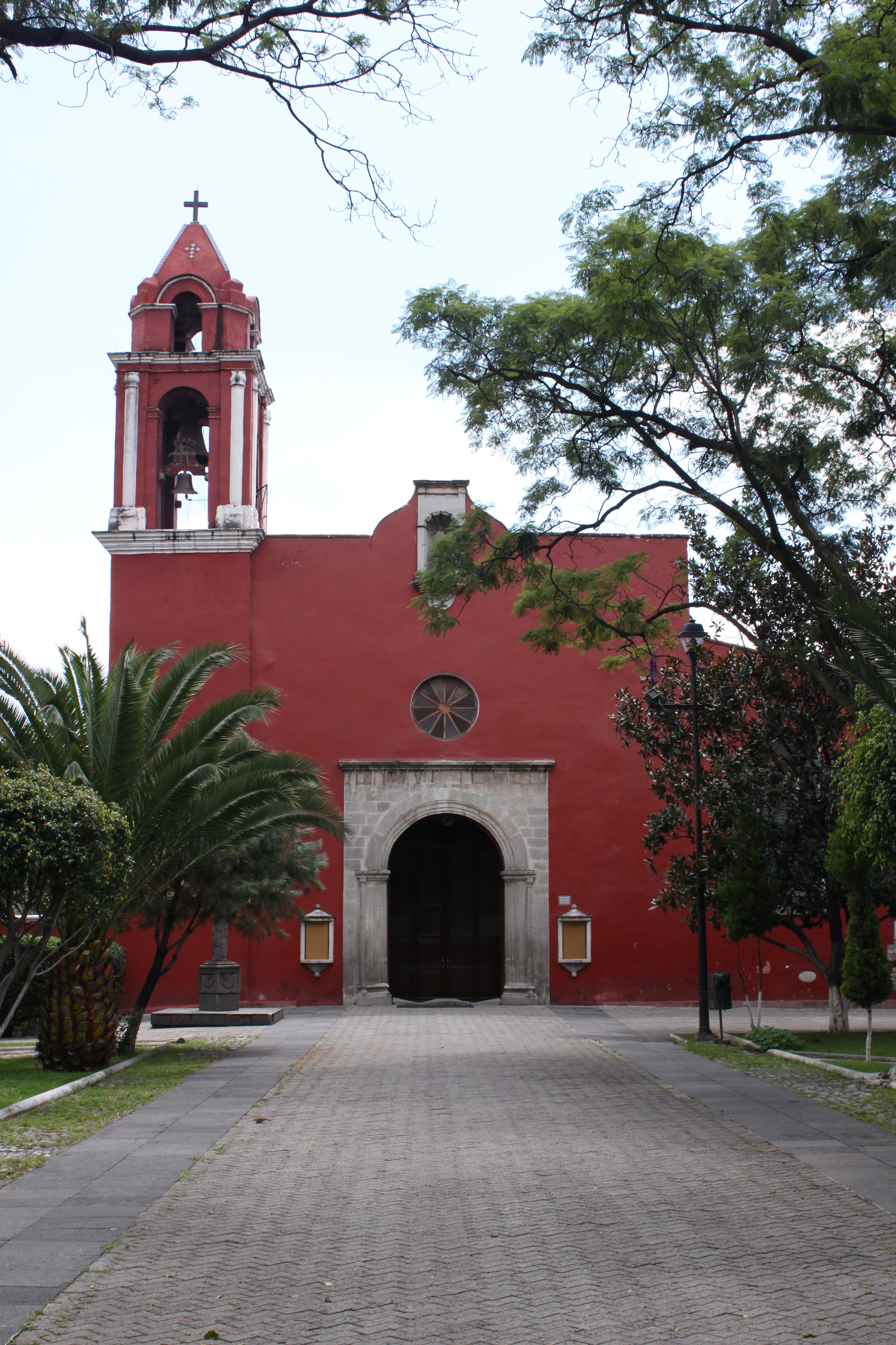 Parroquia de Santo Domingo de Guzmán (Insurgentes Mixcoac)